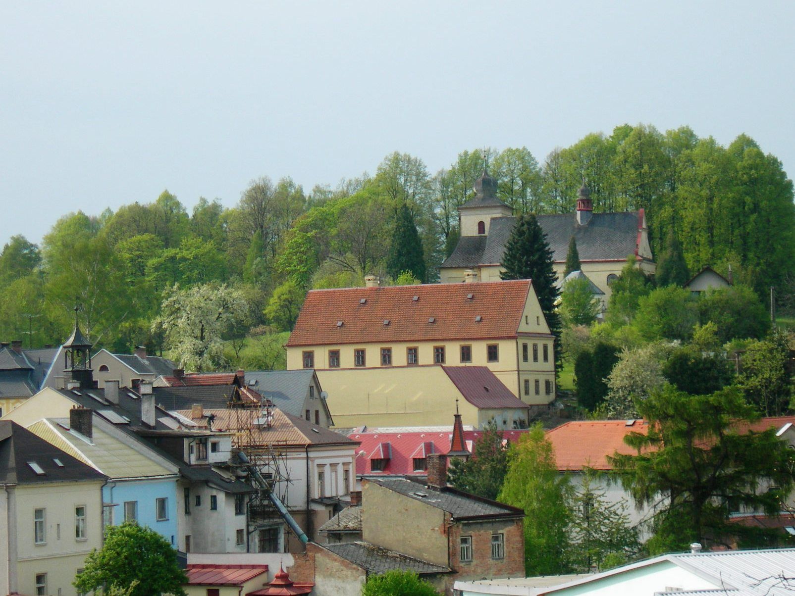 Jablonné nad Orlicí (CZ): vlevo věžička radnice, vpravo fara a kostel